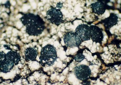 Lecidella carpathica